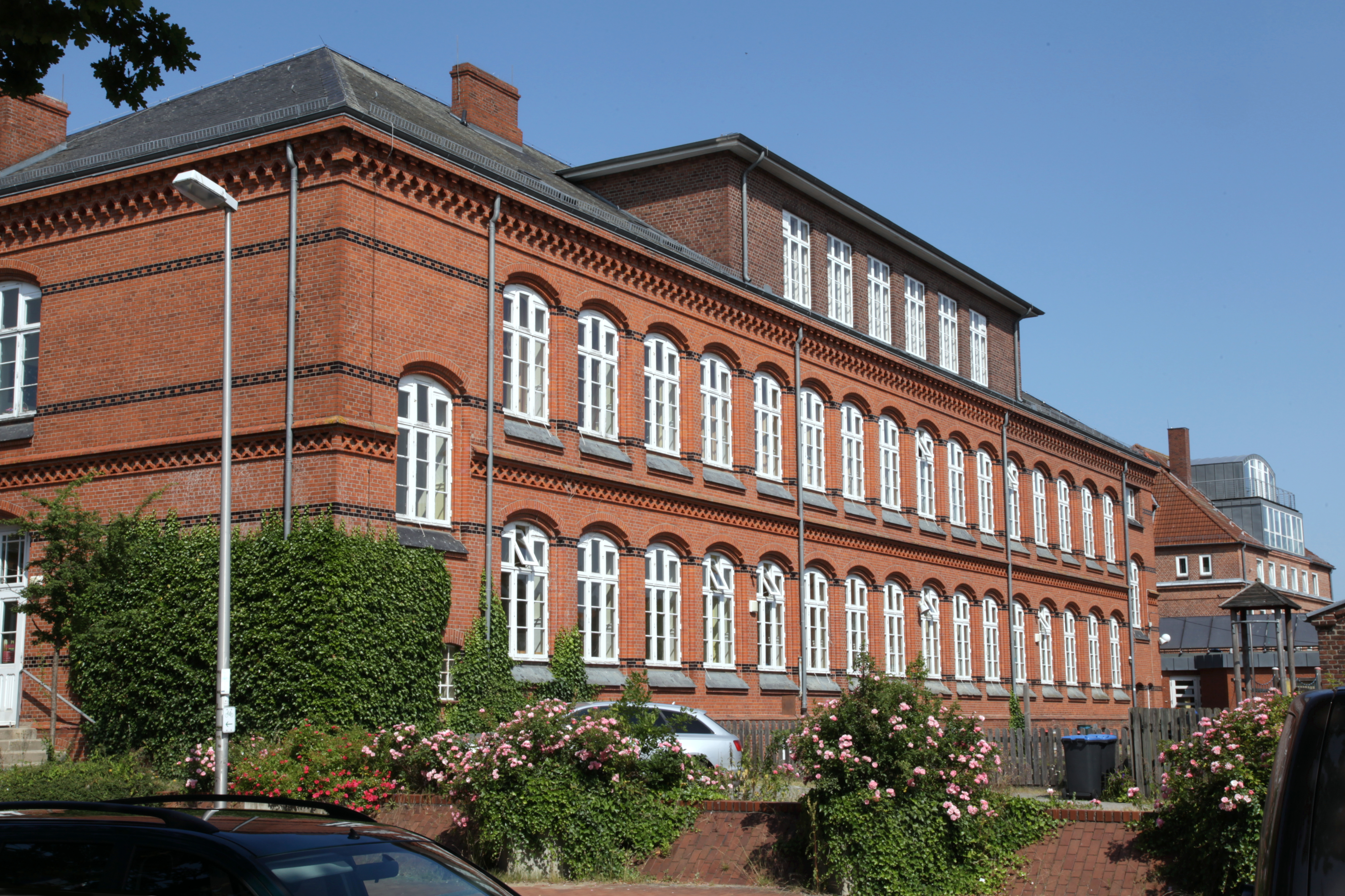 Willers-Jessen-Schule, Kieler Straße 59 in Eckernförde